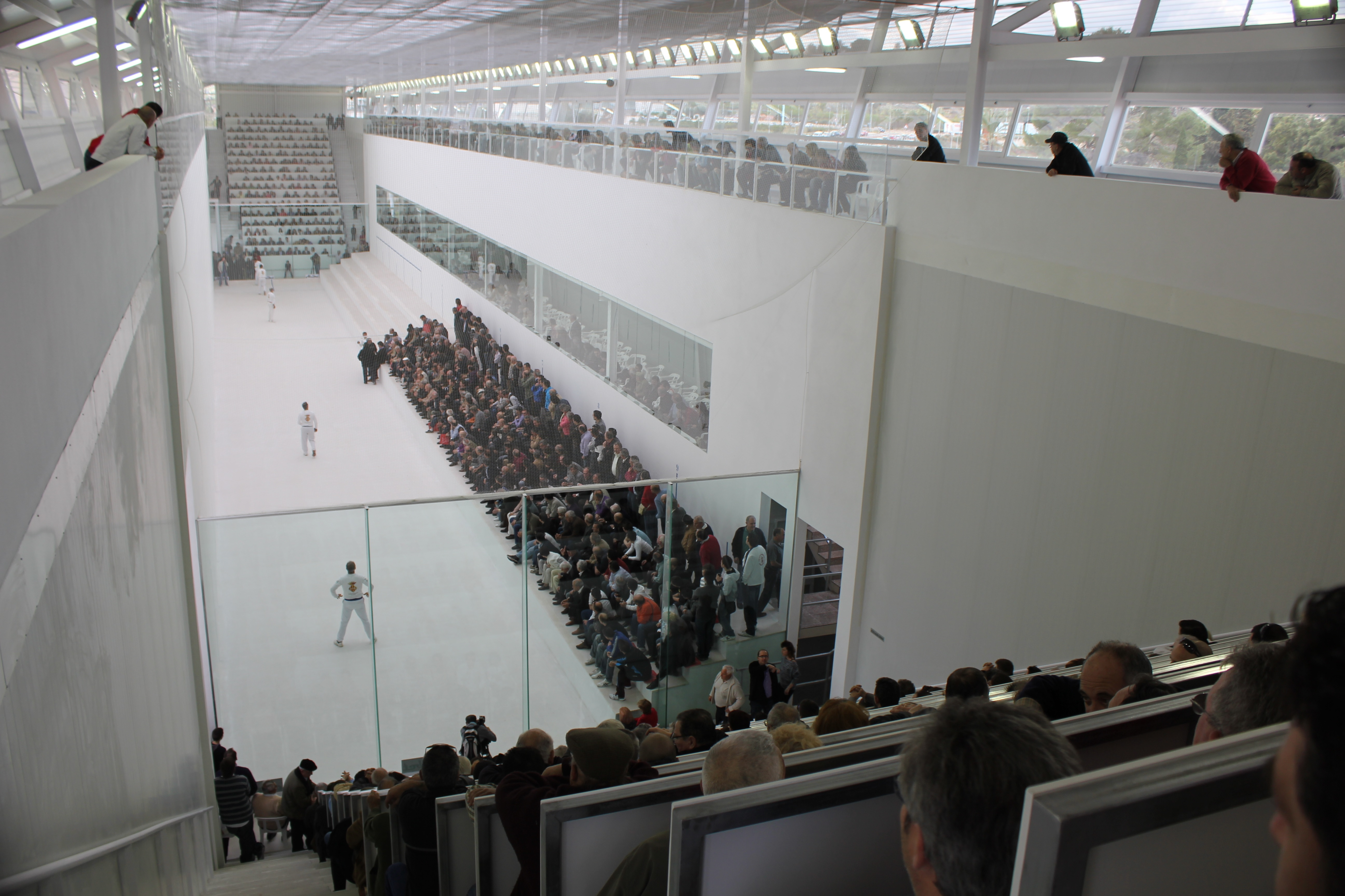 Fotografia de la inauguració del Trinquet, al 2011